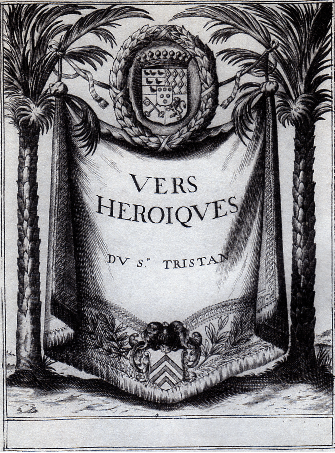 Tristan L'Hermite - Vers héroïques, frontispice